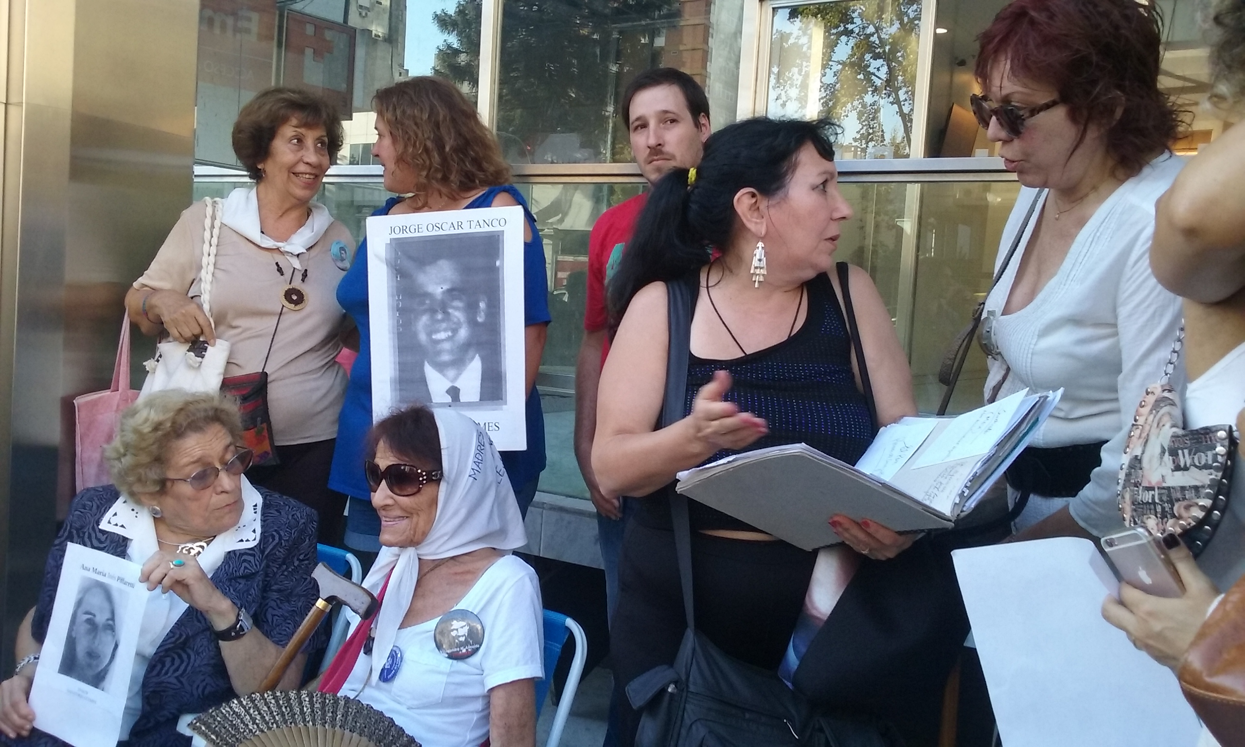 Barrios x Memoria y Justicia/Colocación de baldosas en el Sanatorio Guemes, Av. Códoba 3933/ 3953, CABA, el 16/3/2016. Se contó con la presencia de Taty Almeida y María Adela Antokoletz, de Madres de Plaza de Mayo Línea Fundadora